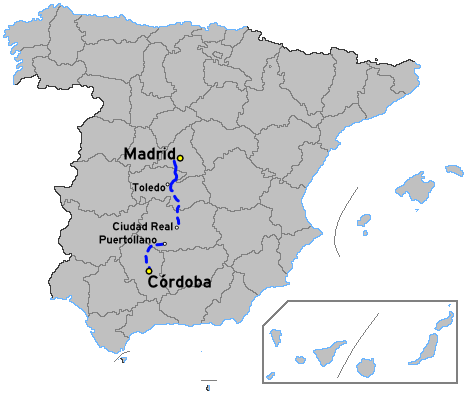 mapa de la autopista española ap41